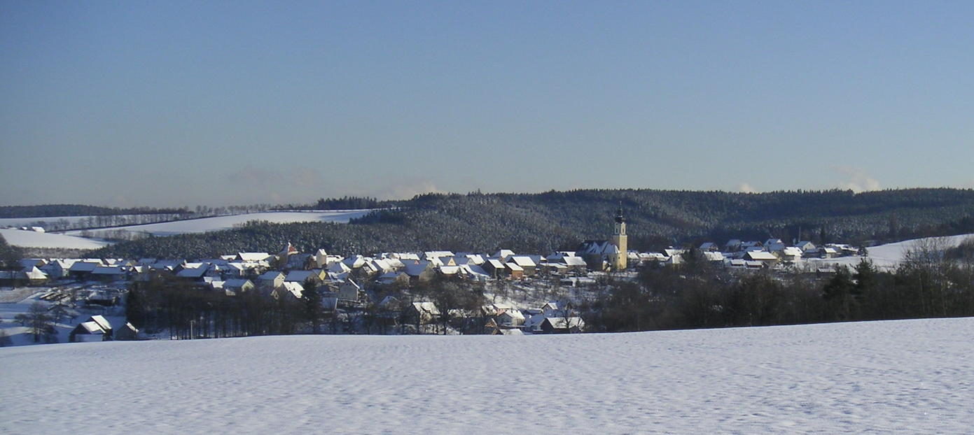 Blick vom Parkplatz an Landstraße auf Kohlberg